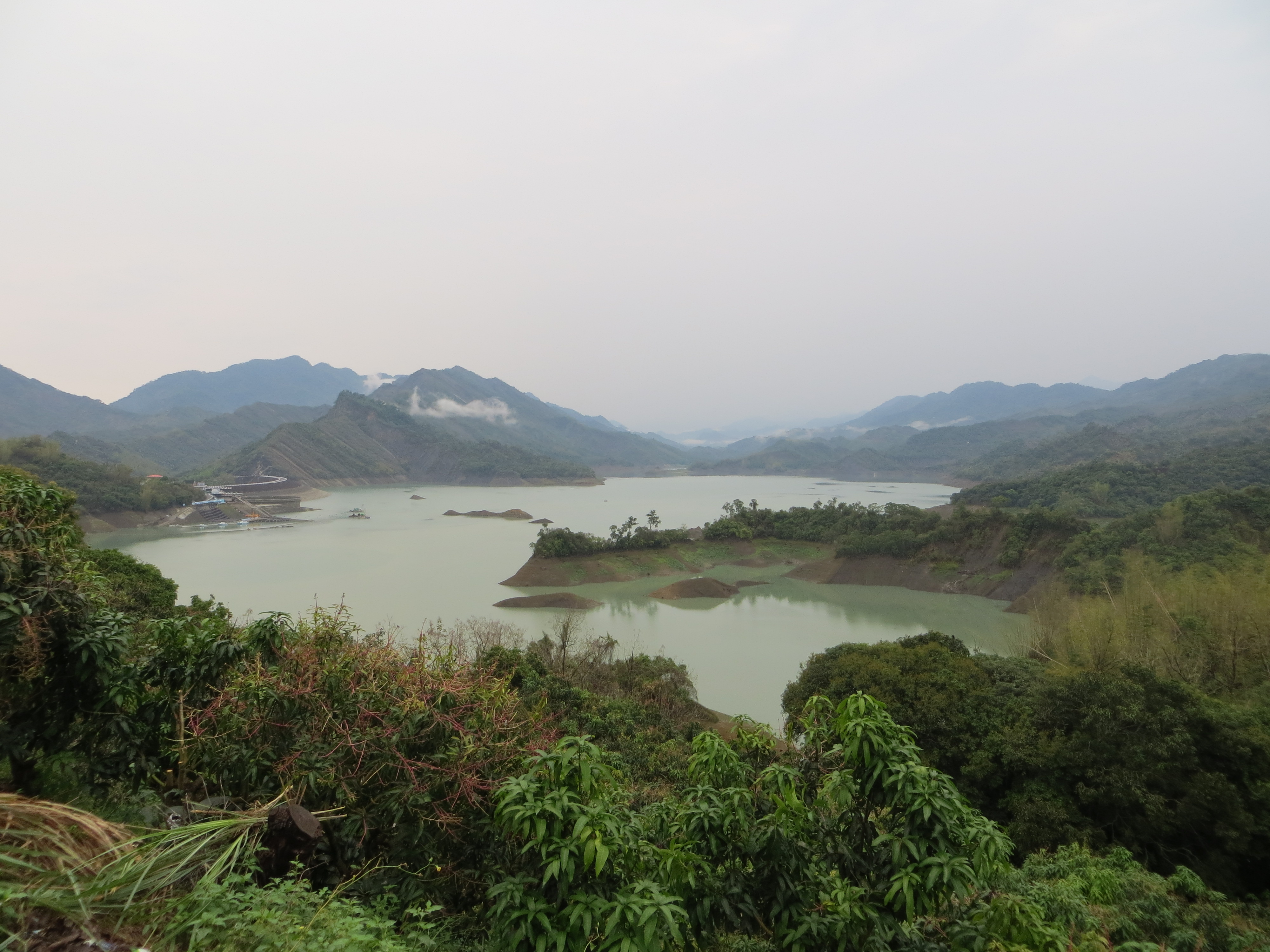 自台20線望向南化水庫蓄水區及霸頂